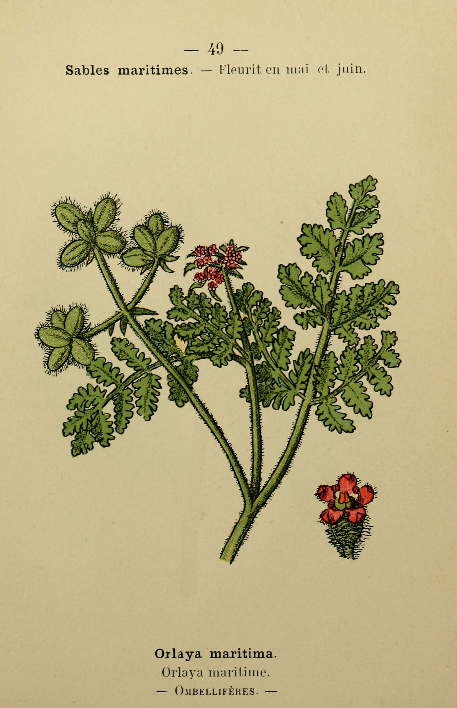 49 -- Sables maritimes. — Fleurit on mai et juin. Orlaya maritima. Oiiaya maritime. — O.MBELLIFÈRES. —